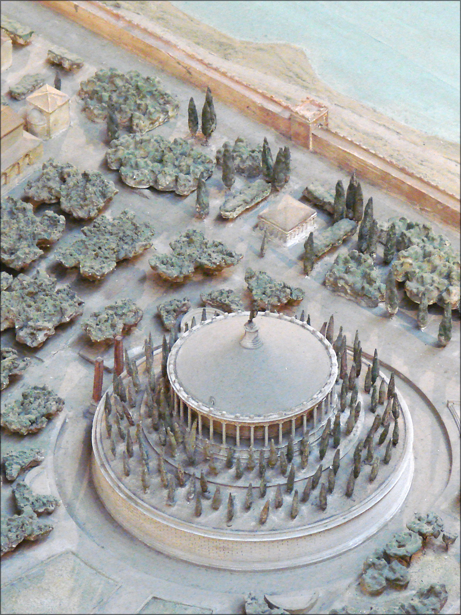 Le mausolée d'Auguste Le Mausolée d'Auguste a été érigé en 28 av. J.-C. De plan circulaire (diamètre 90 m, hauteur 42 m), il est construit sur le modèle des tumulus étrusques. La statue de l'Empereur était au centre, au sommet d'un pilier.